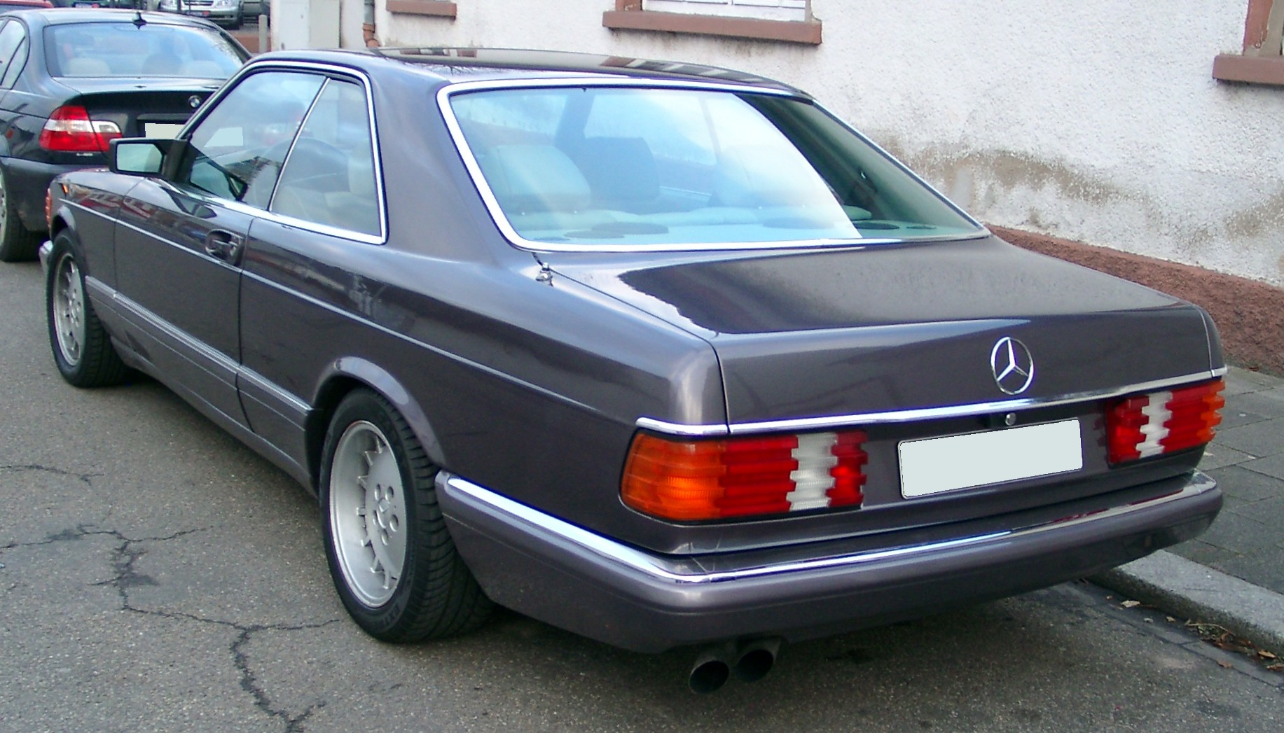 Mercedes C126